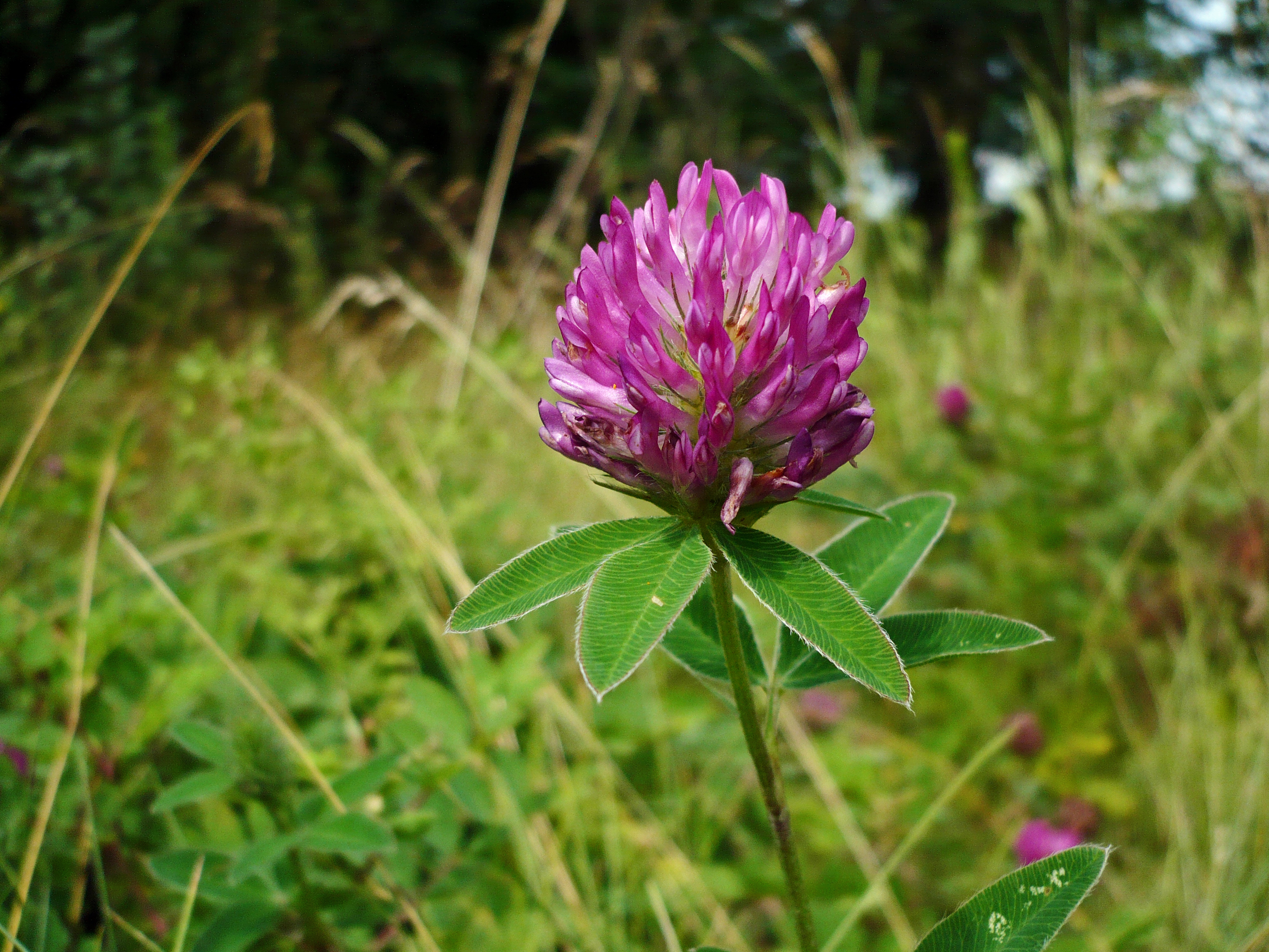 Клевер средний. Балка Пестрая Белгородская область.